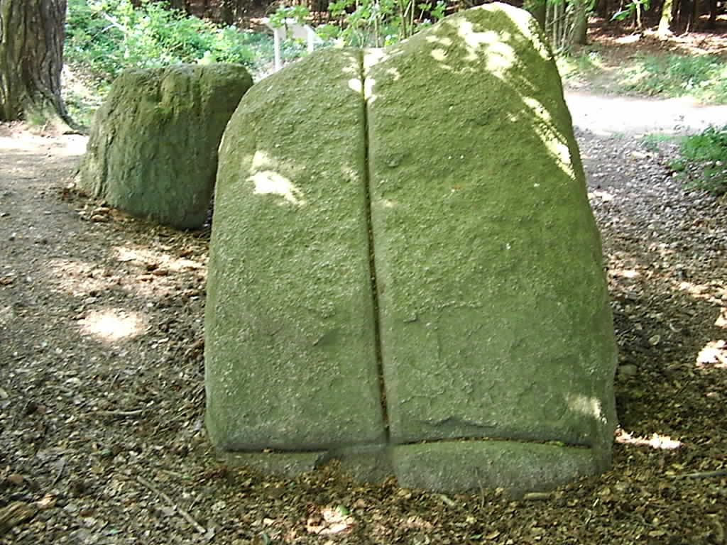 Der abgebildete Findling mit der Kreuzrille ist Bestandteil der neolithischen Grabstätte „Ziegensteine“ auf der Insel Rügen (Gemarkung Burtewitz, Gemeinde Lancken- Granitz). Um diese Anlage ranken sich Legenden. Die „Zäg- oder Siegsteine“ werden bei Alfred Haas (Volkskundler auf Rügen) in seiner Sagensammlung beschrieben. So soll hier eine Schlacht zwischen den Mönchgutern und Putbusern stattgefunden haben, wobei Riesenweiber den Putbusern zum Sieg verhalfen. Zur Erinnerung haben die Riesenweiber diese Steine errichtet. Der Findling, ein Granit, meist als Opferstein interpretiert, stellt eine vorwirtschaftliche Form zum weiteren Gebrauch dar, die so genannten „Blutrillen“ entstanden sicher in neuerer Zeit ausschließlich zum Zwecke der Spaltung des Findlings und zu einer weiteren Nutzung des Steinblockes (Einfassungen, Grabsteine, Bordsteine, Fundamentsteine u. ä.). Die neolithische Grabstätte wird im „Atlas der Megalithgräber“ unter Nr. 500 von Ernst Sprockhoff erwähnt[1].